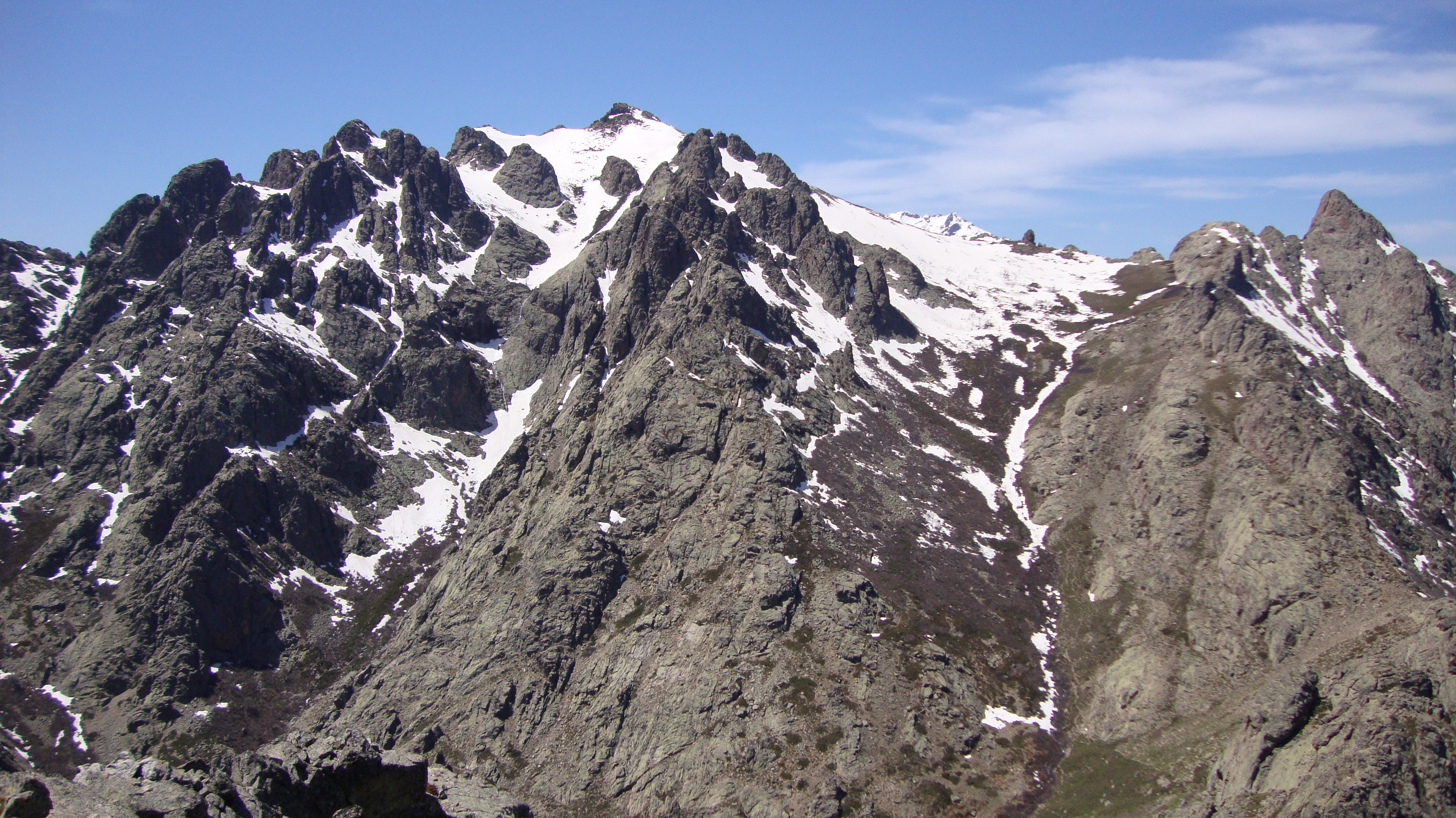 Corsu: A Cima à i Mori (2 180 m) à mezu è u Tragunatu (2 065 m) à diritta, cime di u massicciu di e Penne Rosse